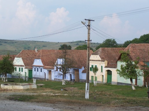 Sächsische Höfe auf der hauptstrasse in Viscri